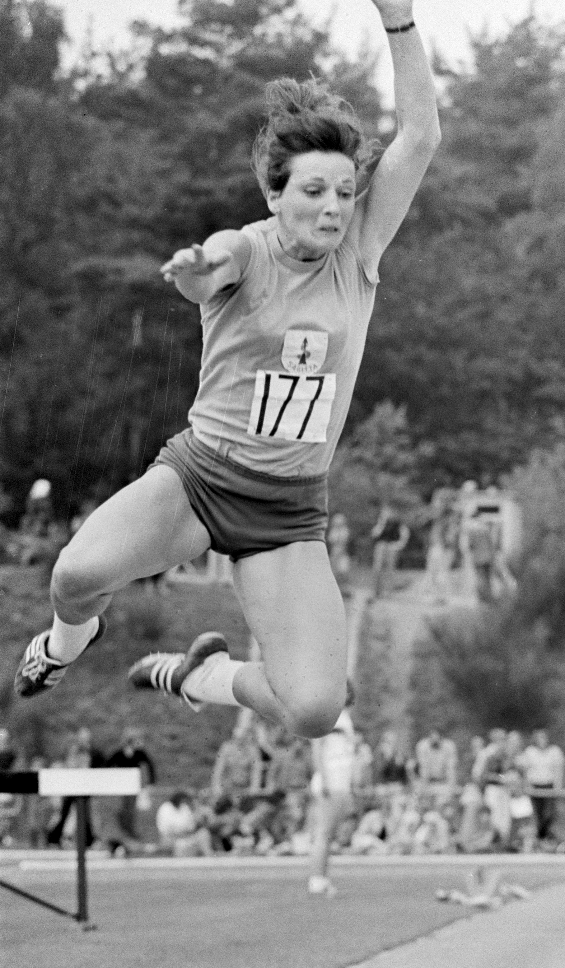 Nederlandse atletiekkampioenschappen 1974 op Papendal; Ciska Janssen springt 6,45, nieuw Nederlands record